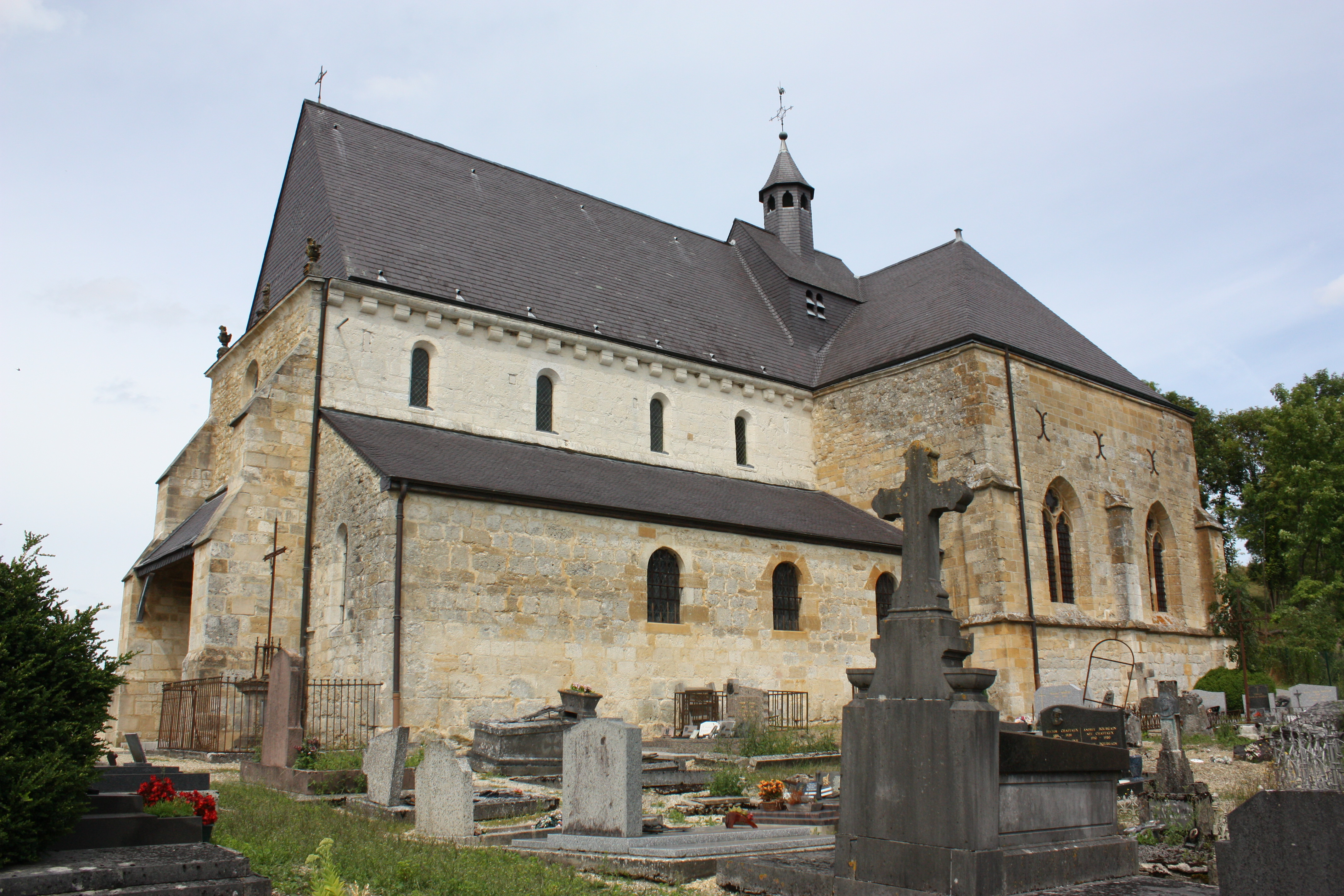 Église Saint-Loup de Saint-Loup-Terrier (Ardennes, France) .